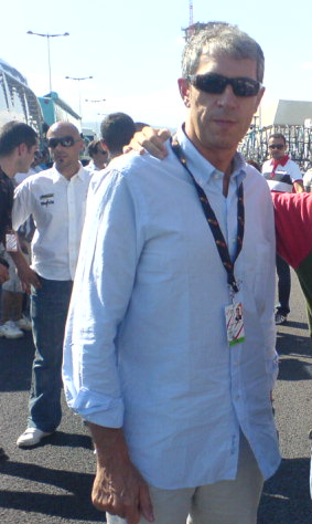 Carlos de Andrés durante la Vuelta a España 2009 a su paso por Murcia.